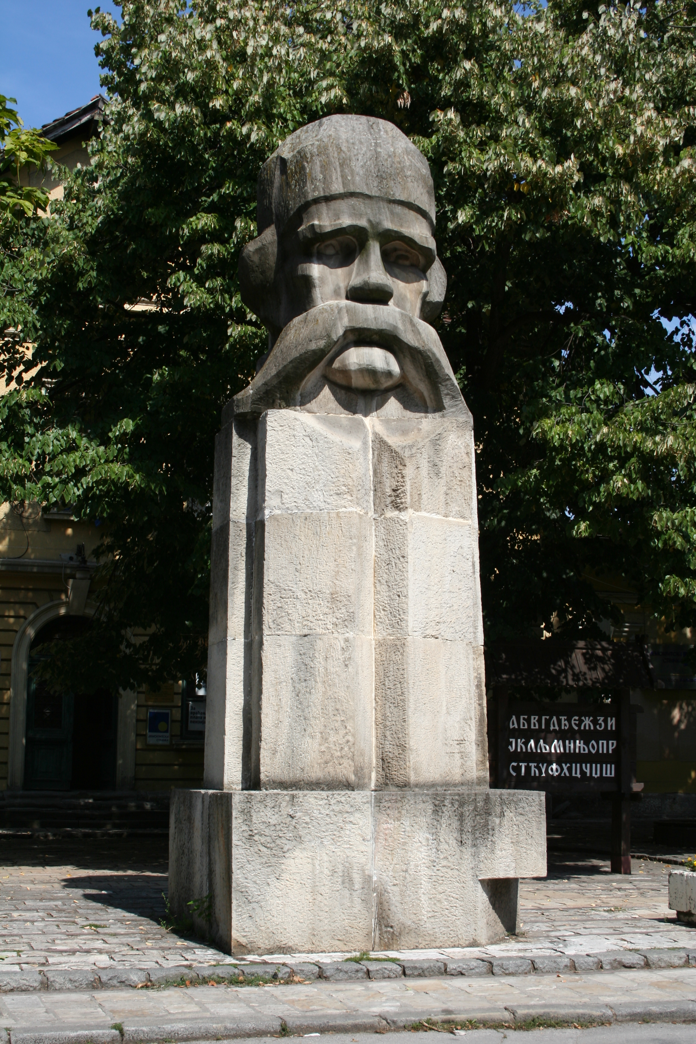 Spomenici Valjevo